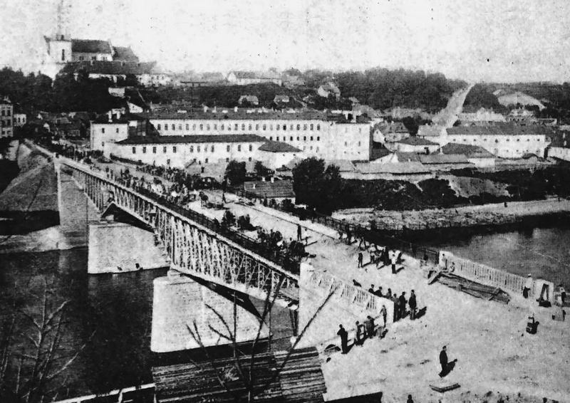 Здание бывшей махорочной фабрики, построенное в XIX веке